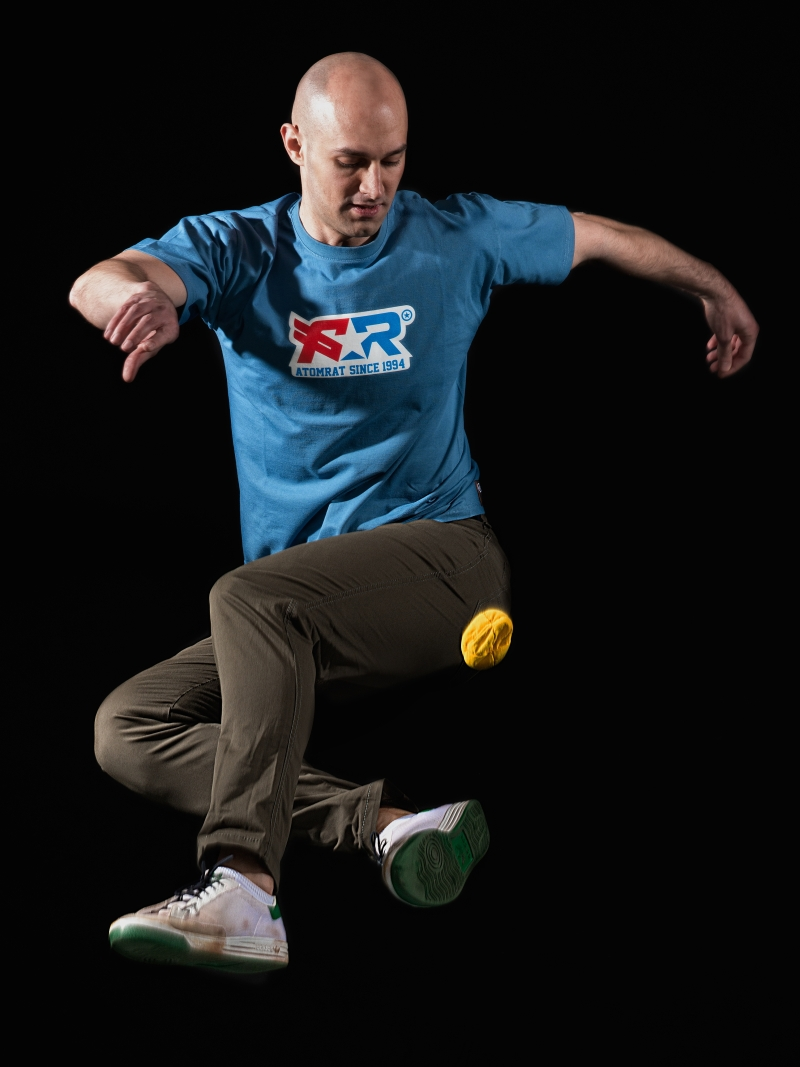 Martin Sládek předvádějící trik ve výskoku